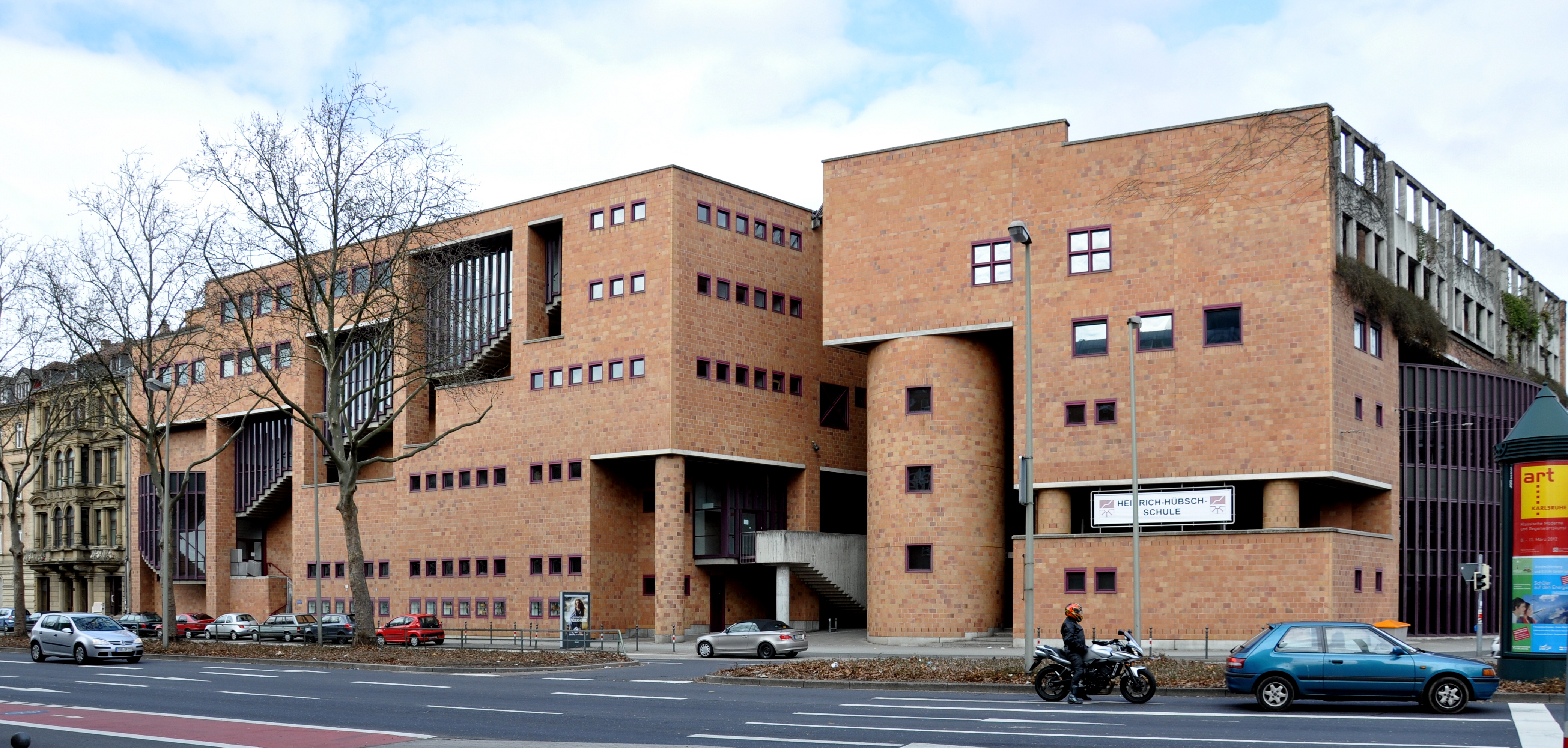 Karlsruhe, Heinrich-Hübsch-Schule, Fassade zur Kriegsstraße